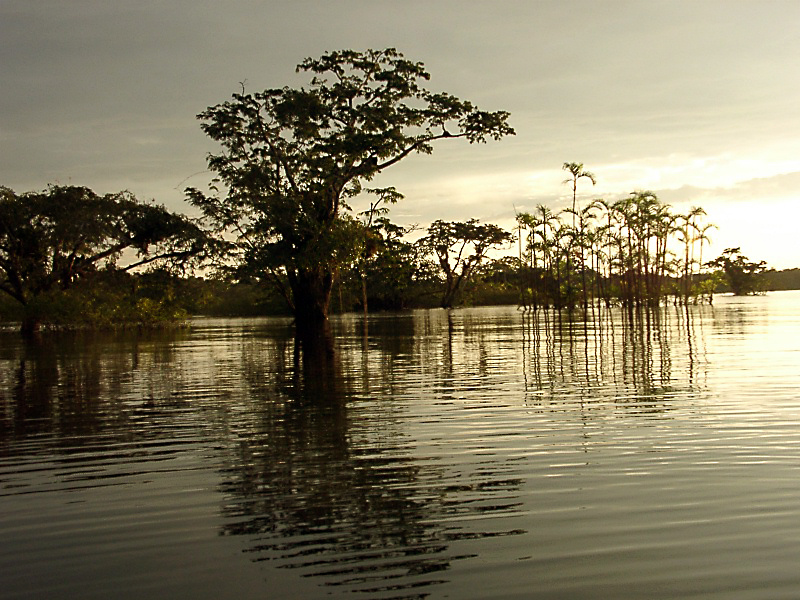 Ecuador Sucumbios Lago Agrio